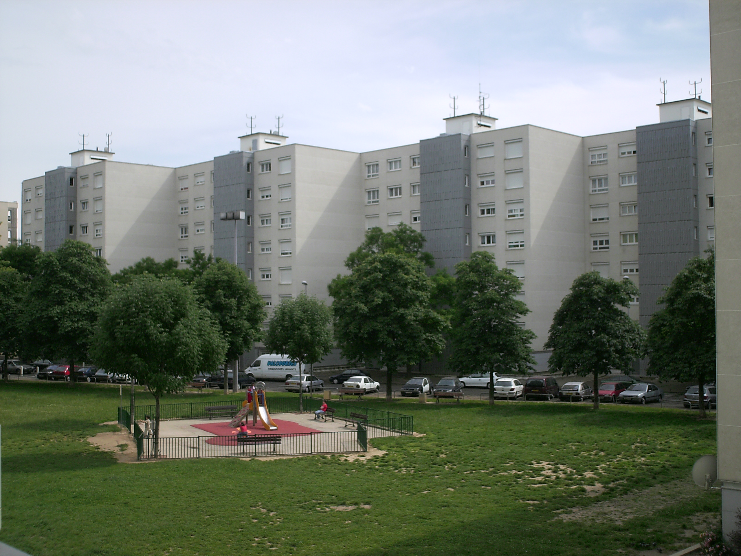 barre du quartier des minguettes a venissieux